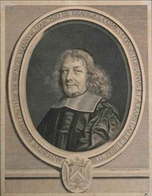 Antoine Barrillon de Morangis, gravure par Robert Nanteuil